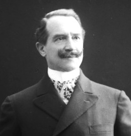 L'attore Andrea Maggi